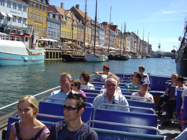 eigen foto Ben Pirard 2005